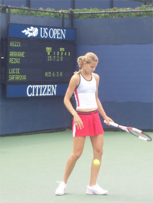 Czech tennis player Lucie Šafářová at US Open 2006